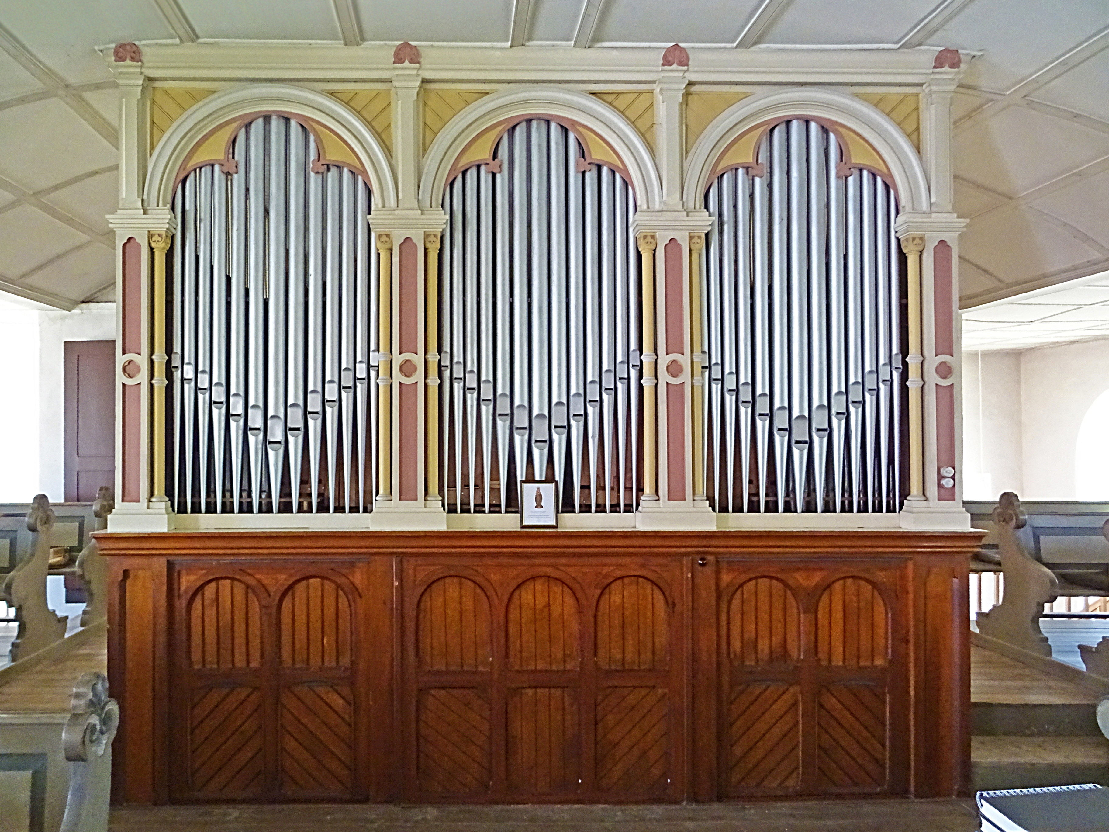 Orgel von Otto Petersilie (1900, IIP/18) in der Dorfkirche St. Bartholomäus (Hohengandern)[1]